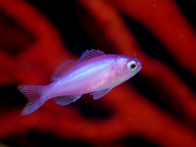 ハナゴイyg Pseudanthias pascalus